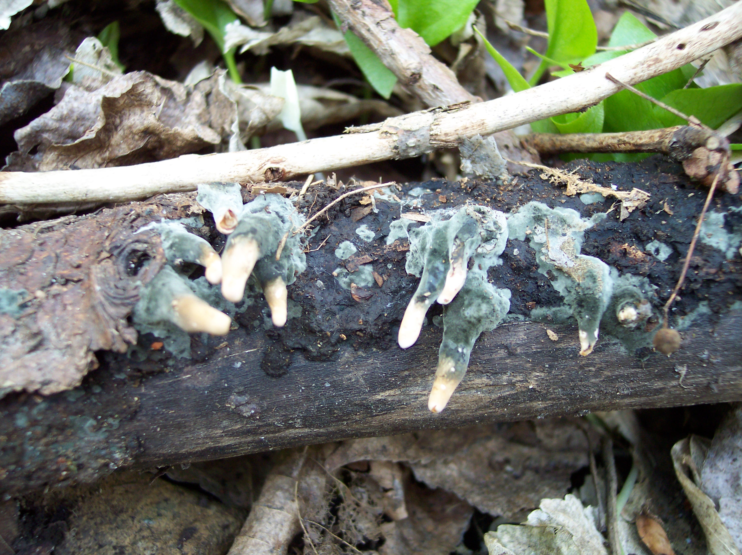 Die Nebenfruchtform der Langstieligen Ahornholzkeule (Xylaria longipes).